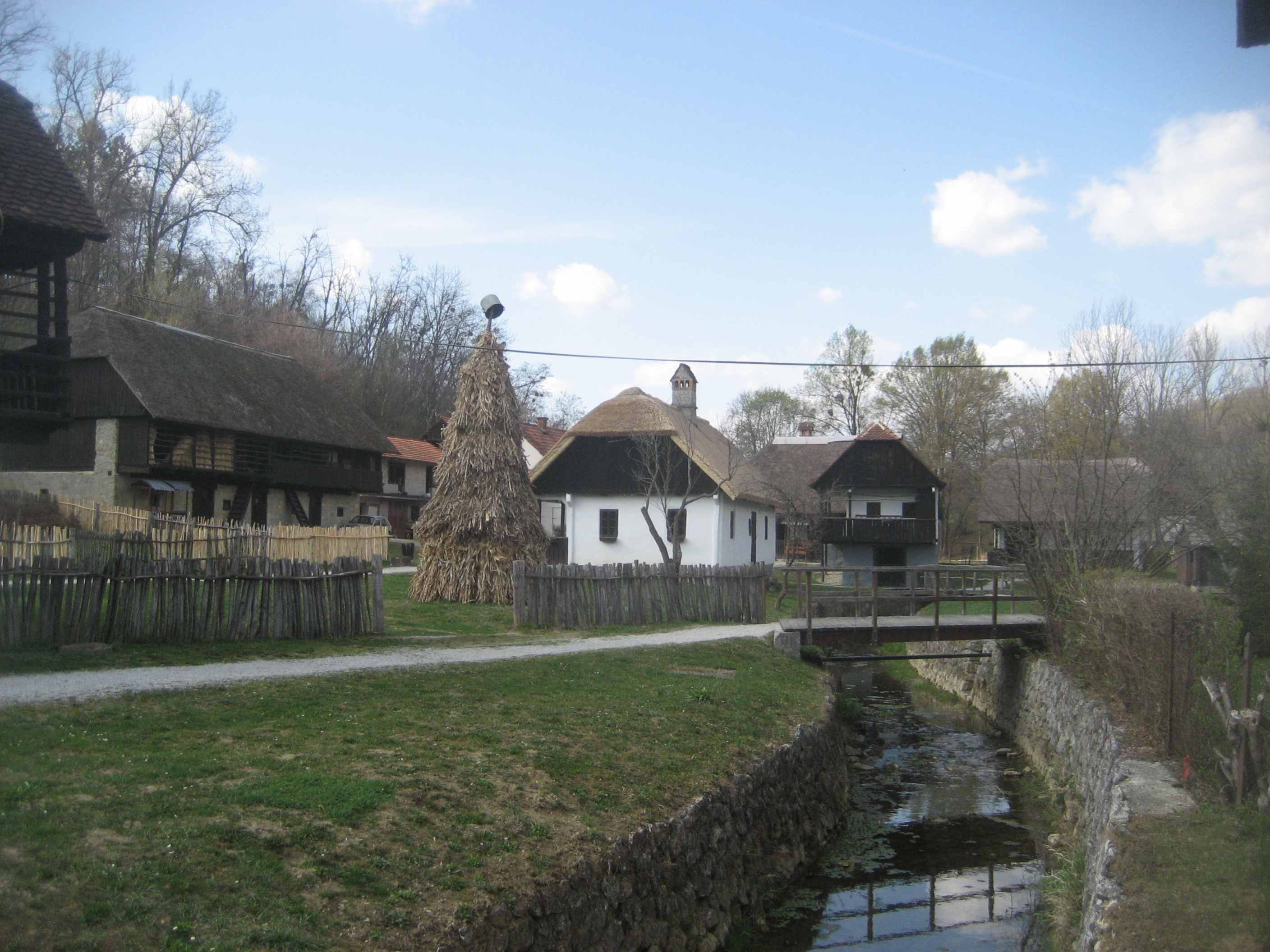 Etno-selo Kumrovec